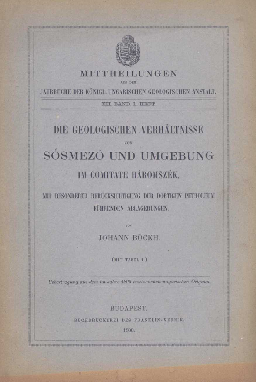 Titelblatt: Die geologischen Verhältnisse von Sósmezö und Umgebung im Comitate Háromszék.